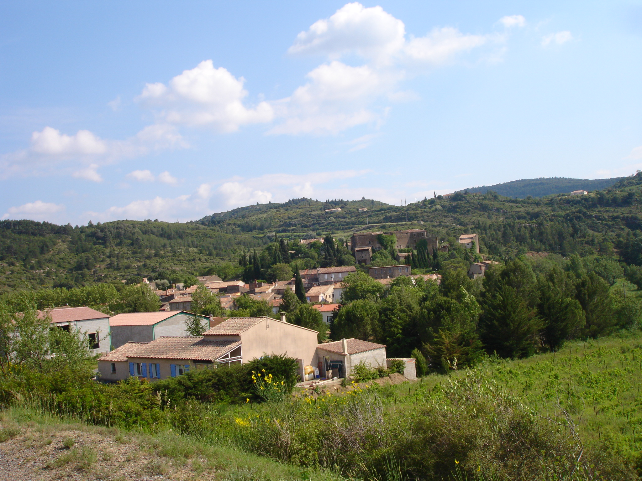 France, Aude (11), Village de Saint-Pierre-des-Champs